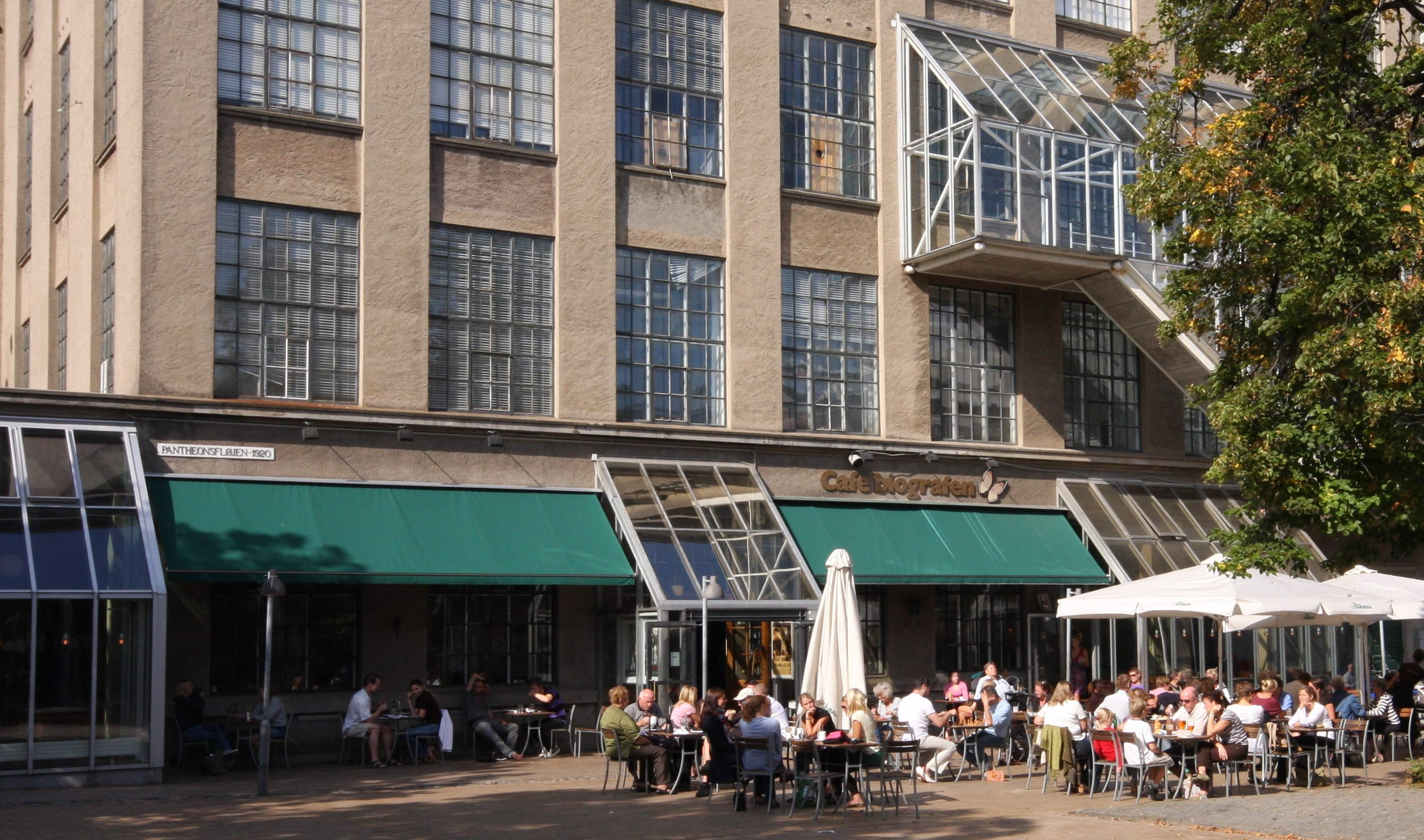 The Cafébiografen cinema in Odense